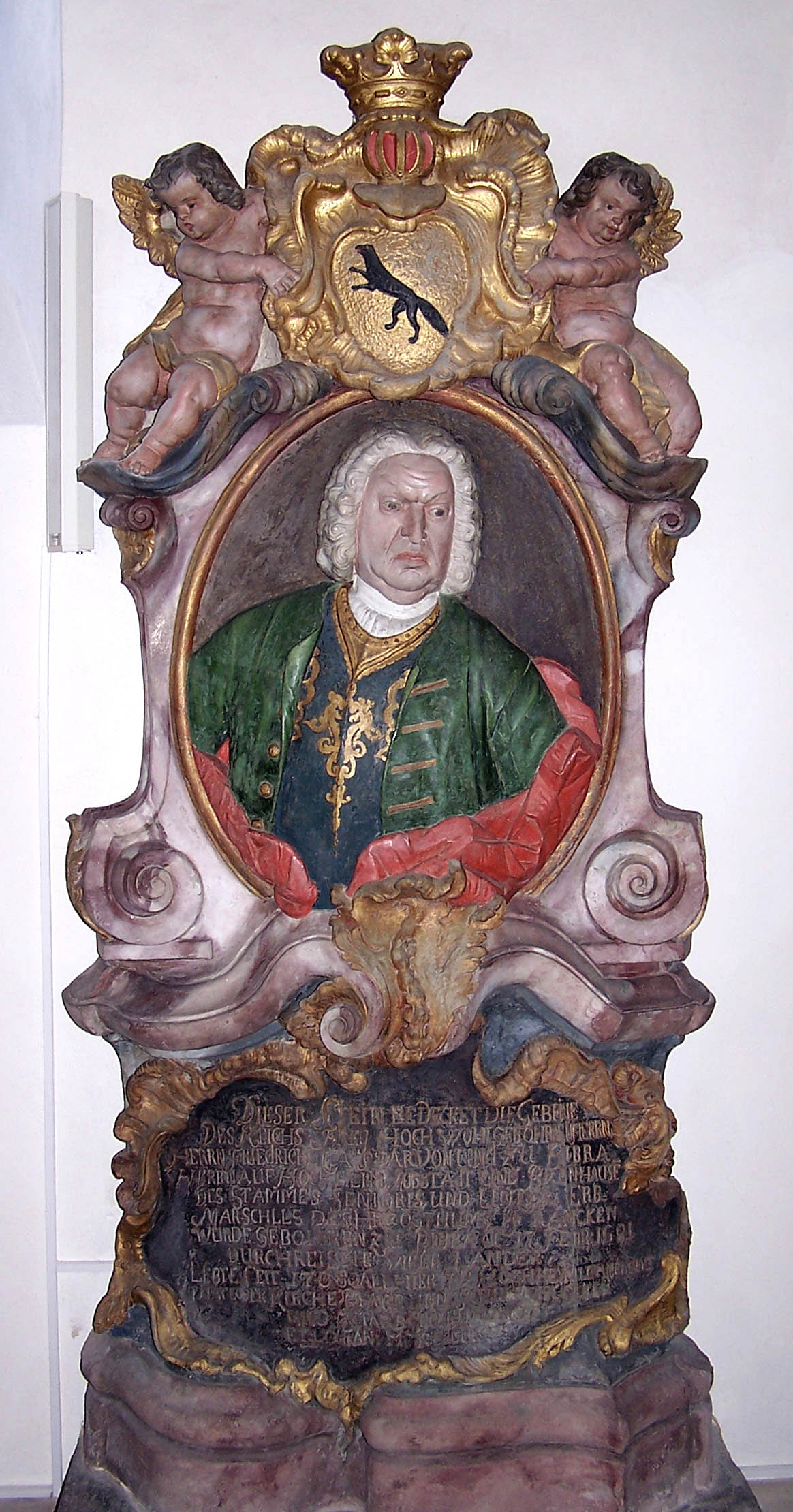 Höchheim Friedrich Kaspar von Bibra (1681-1750) grave